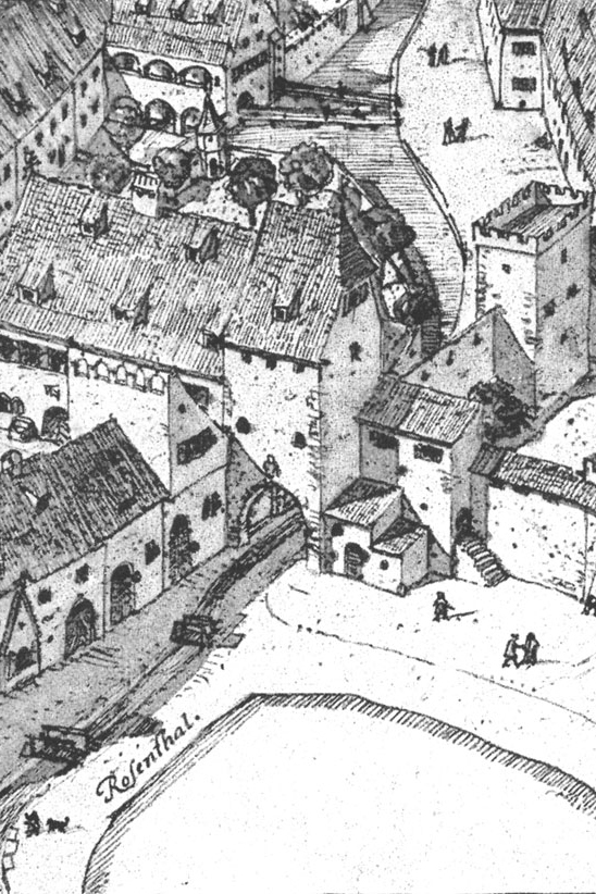 Abb. 31. Das Rosentor (der Seefeldbogen), Innenseite.